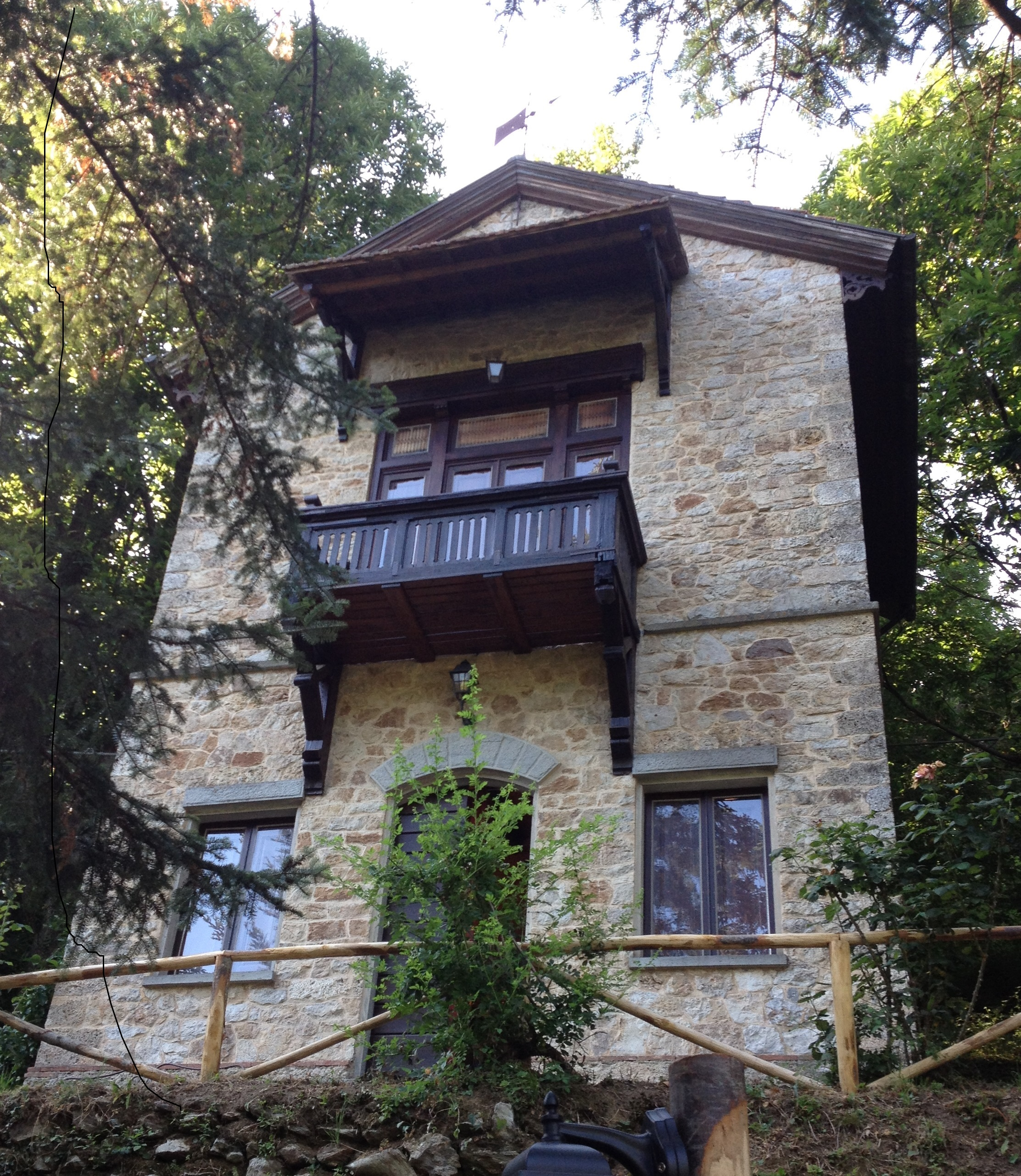 Un'immagine dello Studio Simi